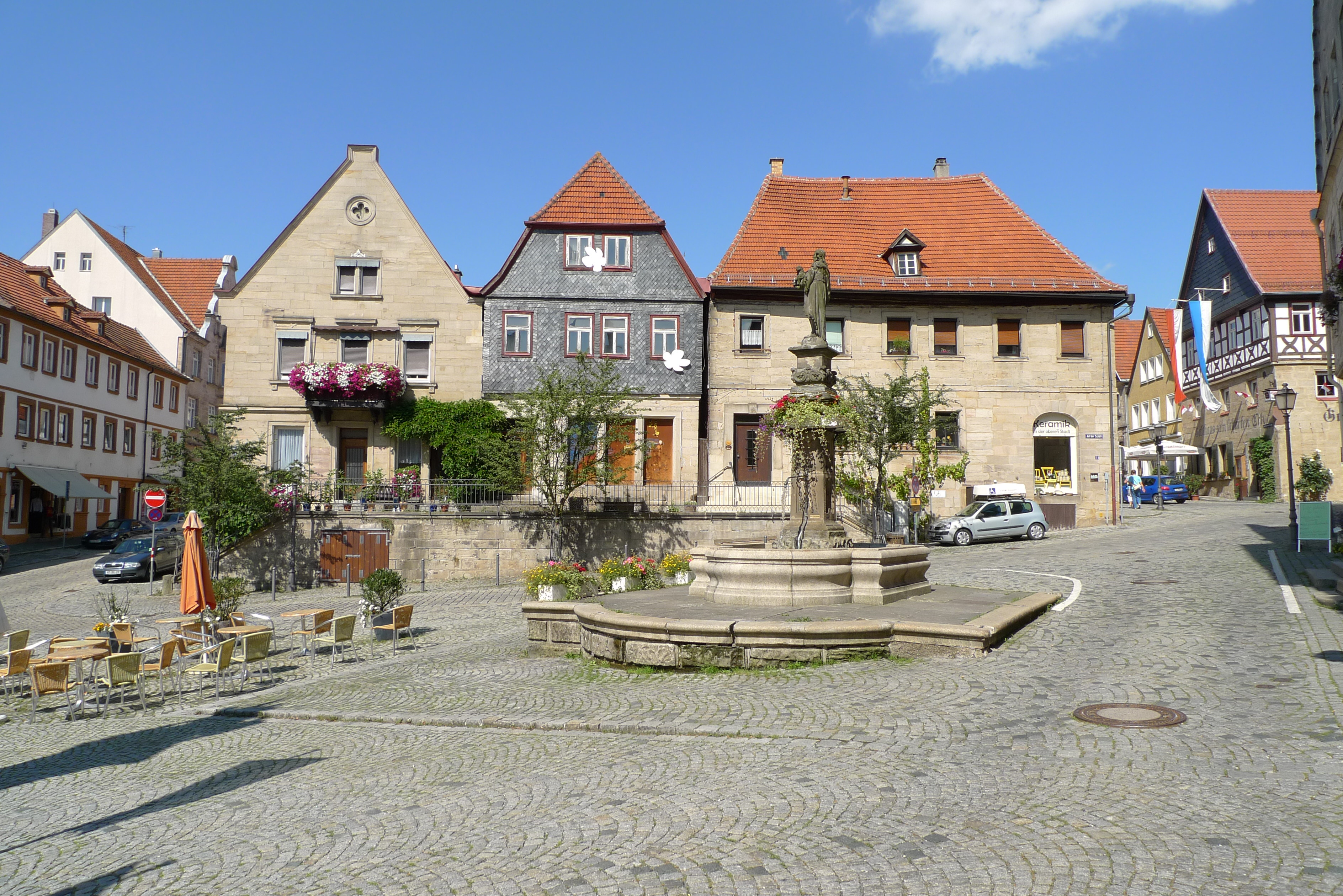 Melchior-Otto-Platz in Kronach mit St.-Johannesbrunnen